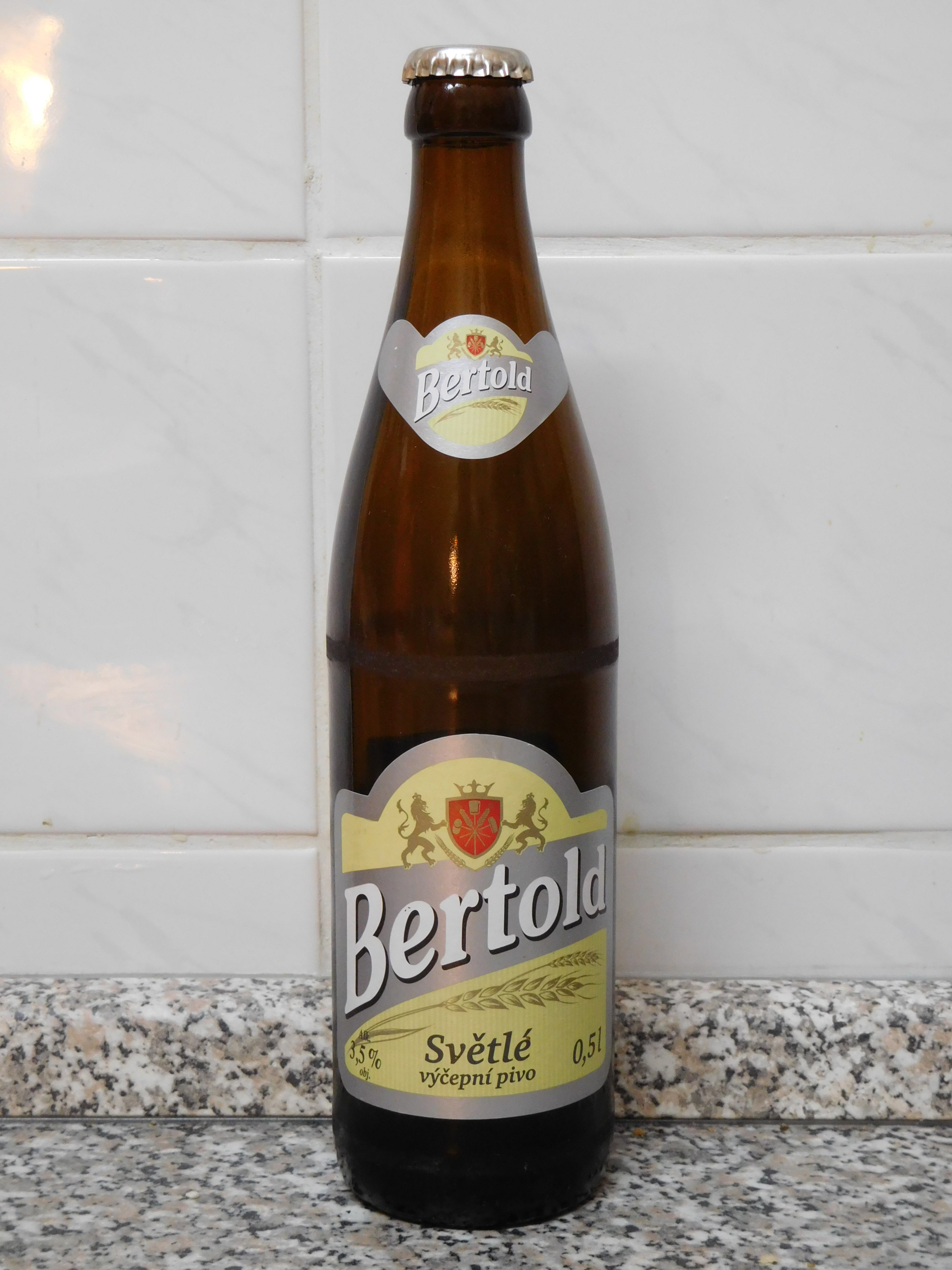 Nymburské pivo Bertold (světlé výčepní)